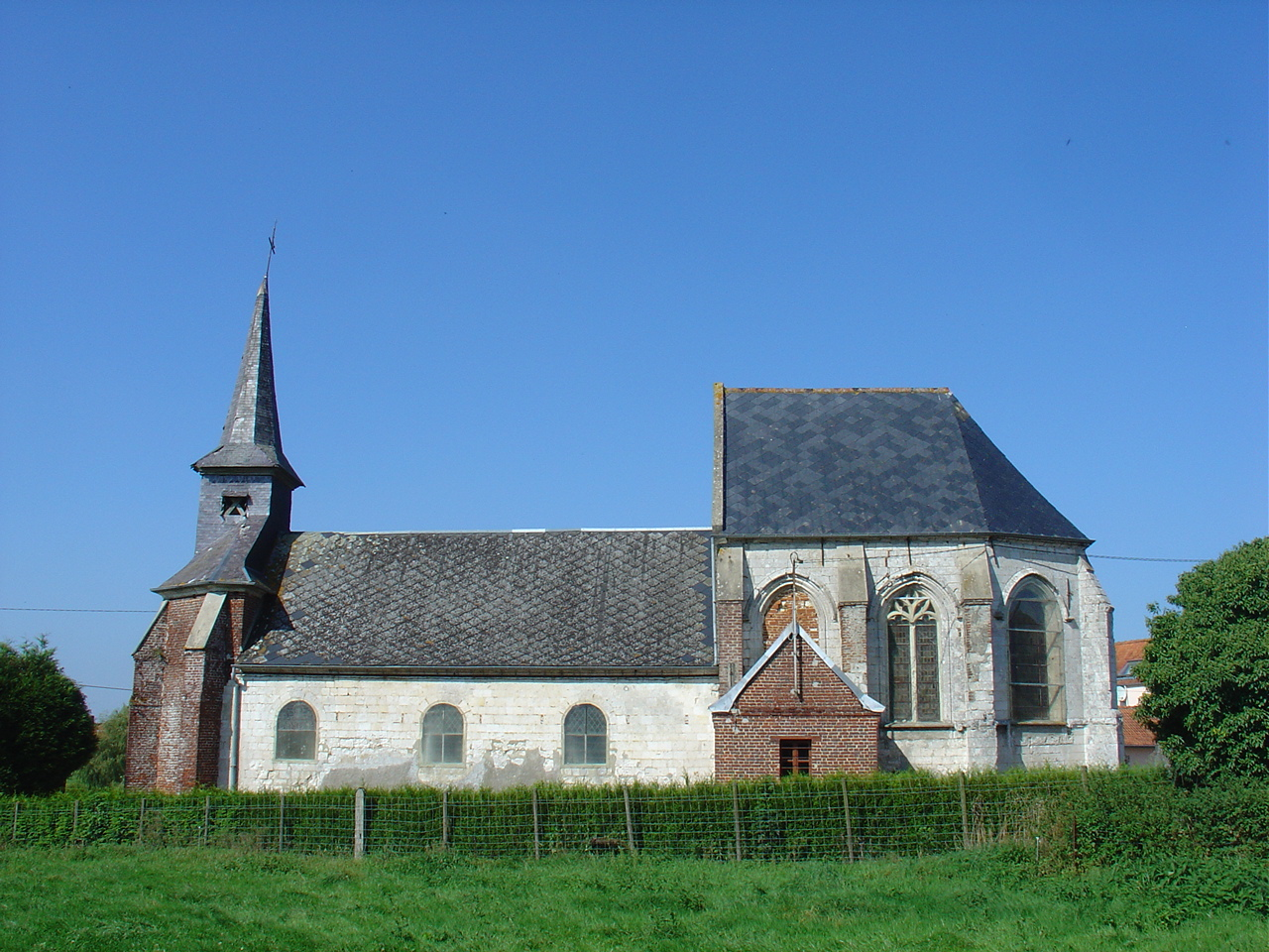 Église d'Huclier